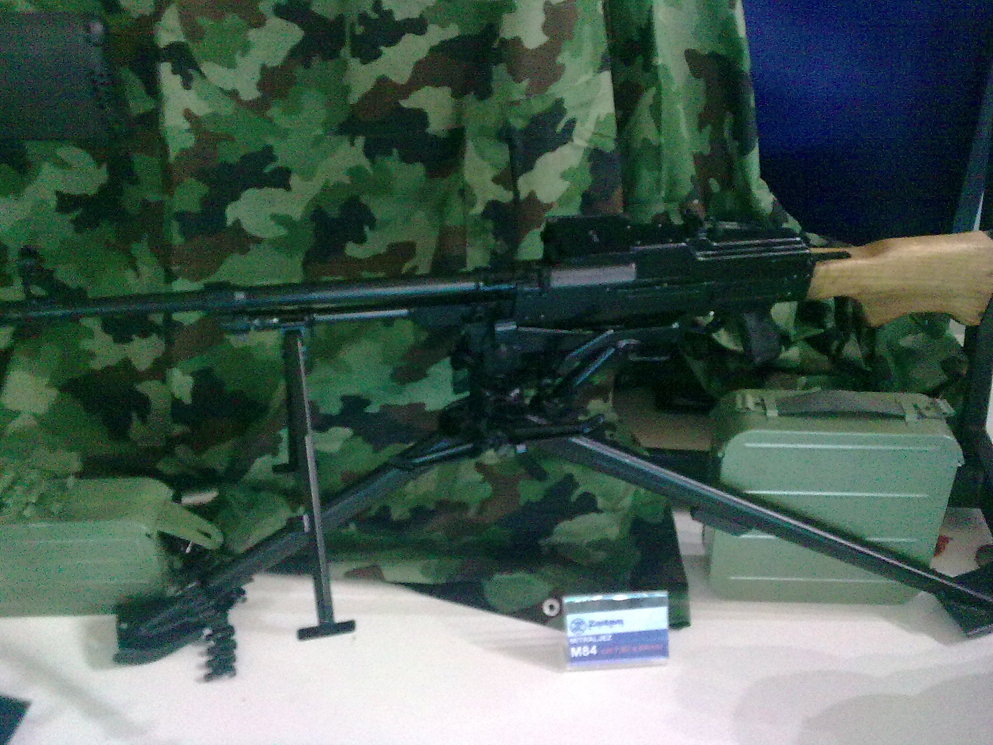 Митраљез М84 на сајму НВО у Београду.